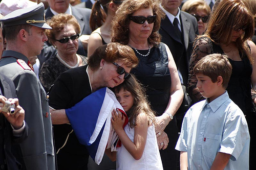 La familia de Pinochet después de su funeral en diciembre de 2006.